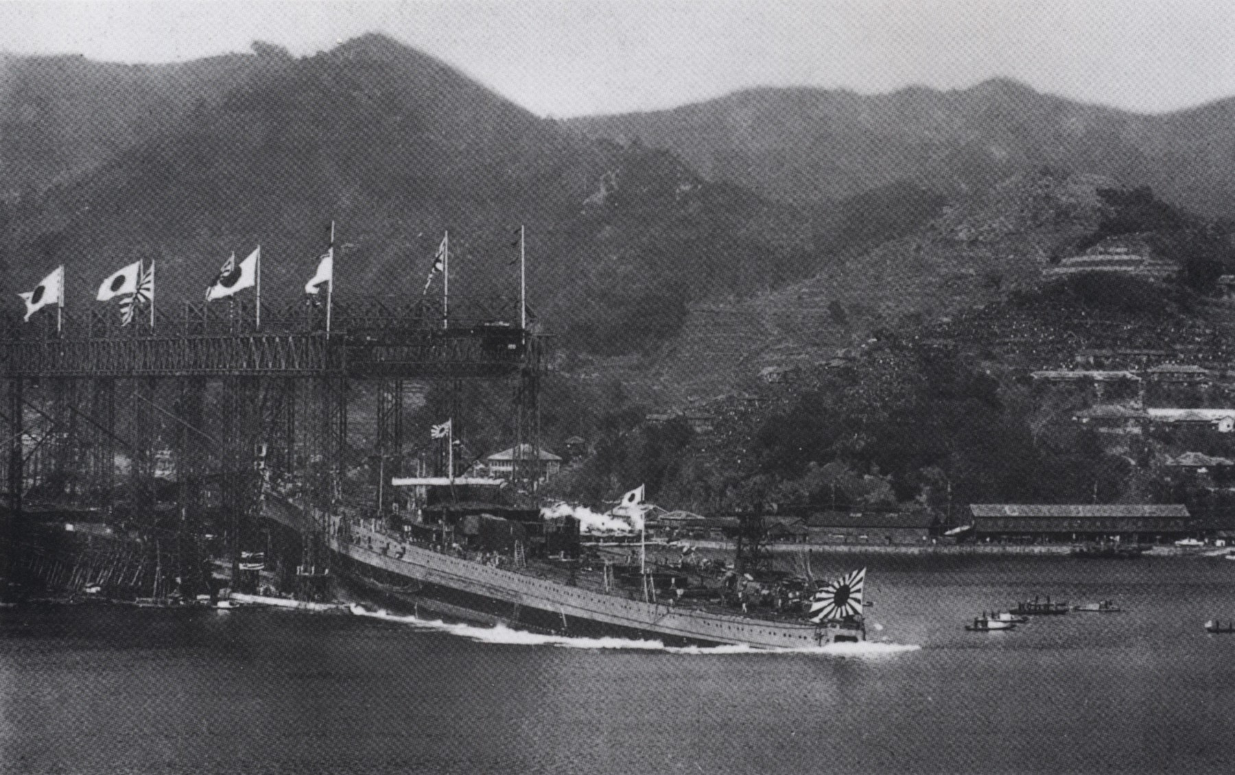 戦艦土佐の進水（長崎県長崎市）